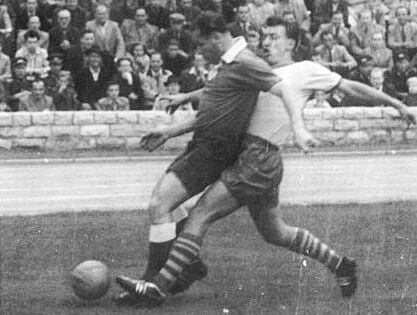 Title: ZSK Vorwärts Berlin - BSG Motor Zwickau Factual corrections and alternative descriptions are encouraged separately from the original description. Additionally errors can be reported at this page to inform the Bundesarchiv. Original historic description: Zentralbild-Wendorf We-Sch. 15.8.1956 ZSK Vorwärts Berlin - BSG Motor Zwickau - Im ersten Spiel der zweiten Meisterschaftshalbserie standen sich am 15.8.1956 im Berliner Jahn-Sportpark die Mannschaften von ZSK Vorwärts Berlin und BSG Motor Zwickau gegenüber. UBz: Zweikampf zwischen Assmy (rechts) und Oettler (Motor Zwickau) noch kurz vor der Außenlinie.